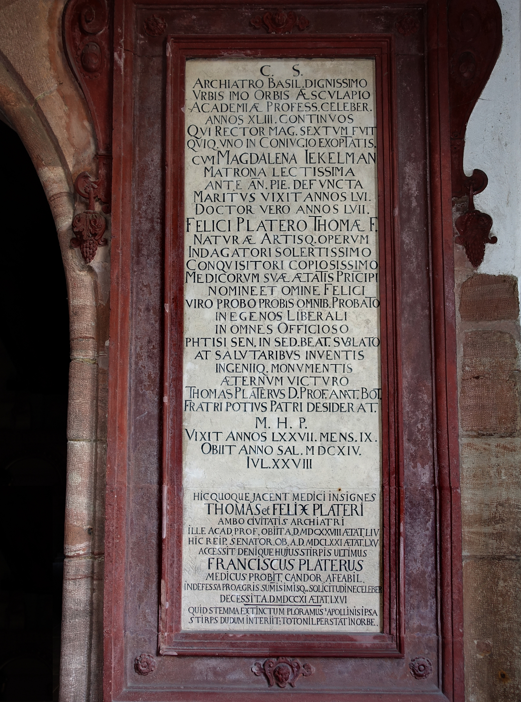 Felix Platter (1605–1671) Arzt, Naturforscher. Professor für Logik und Physik. Autor von verschiedenen astronomischen Schriften. Grab im Kreuzgang des Basler Münsters